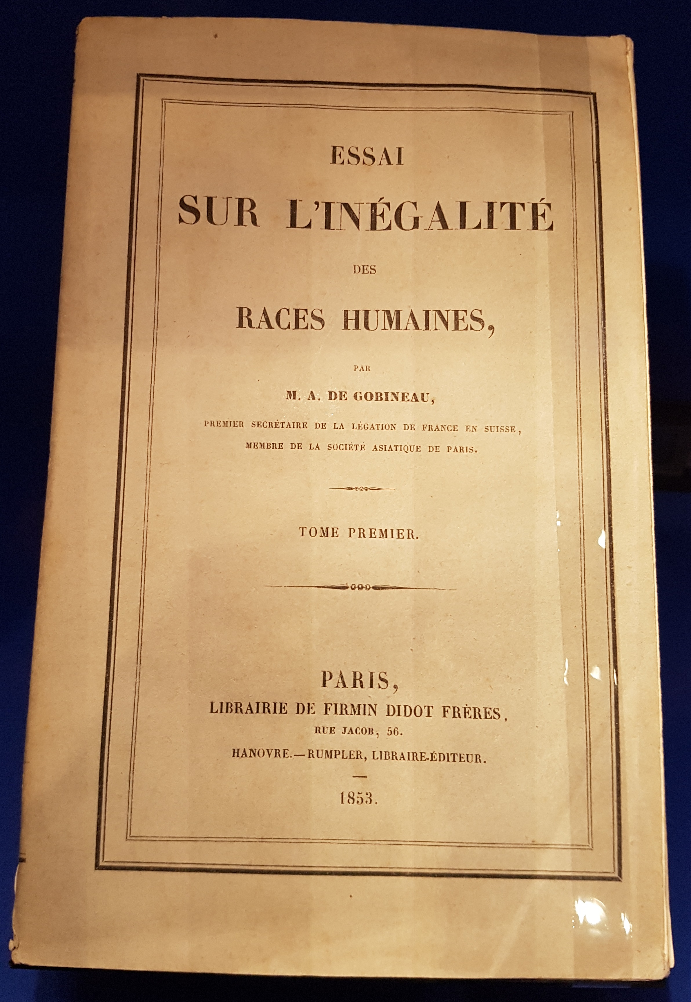 Essai sur l'inégalité des races humaines Arthur de Gobineau (1816-1882) Paris, Firmin-Didot frères, 1853-1855 (édition originale, imprimée aux frais de l'auteur à 500 exemplaires seulement), 4 vol. Muséum national d'Histoire naturelle, Bibliothèque centrale (photo prise lors de l'exposition "Nous et les autres" au musée de l'Homme, Paris, avril 2017)